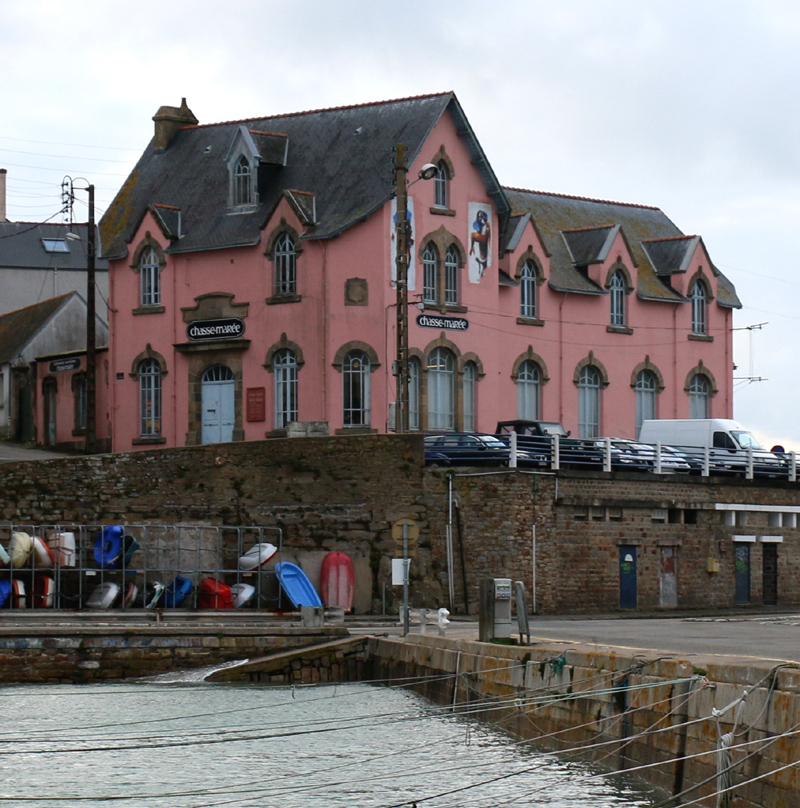 Le siège du Chasse-Marée, l'Abri du Marin. .